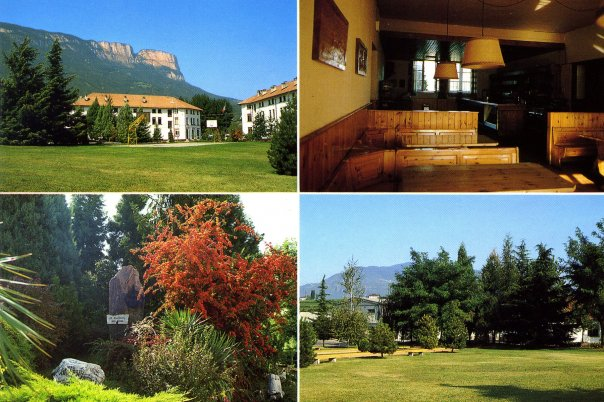 Vedute della caserma A. Mercanti di S.Miche Appiano (BZ), sede fino al 1991 delle Cmp Trasporto del 24° Btg. "Dolomiti"